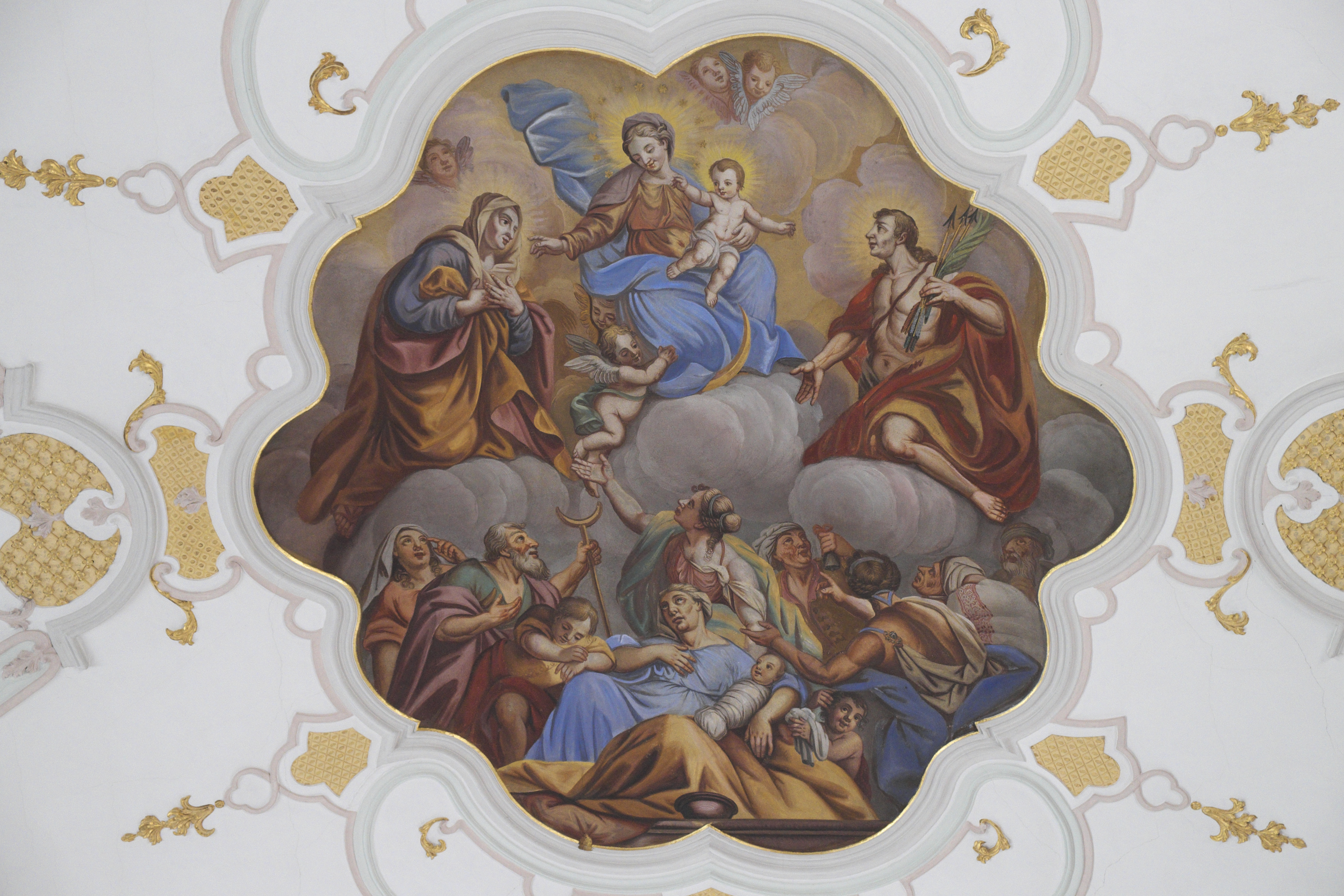 Katholische Pfarr- und Wallfahrtskirche Zu Unserer Lieben Frau in Großgmain im Bundesland Salzburg (Österreich), Deckenfresko von Innozenz Waräthi (Innozenz Anton Warathy), von 1735, Darstellung: Maria als Trösterin der Betrübten